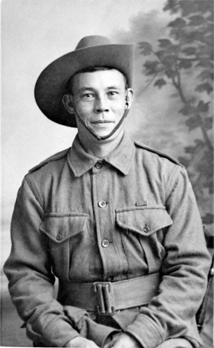 Gale's Studios Ltd c 1918